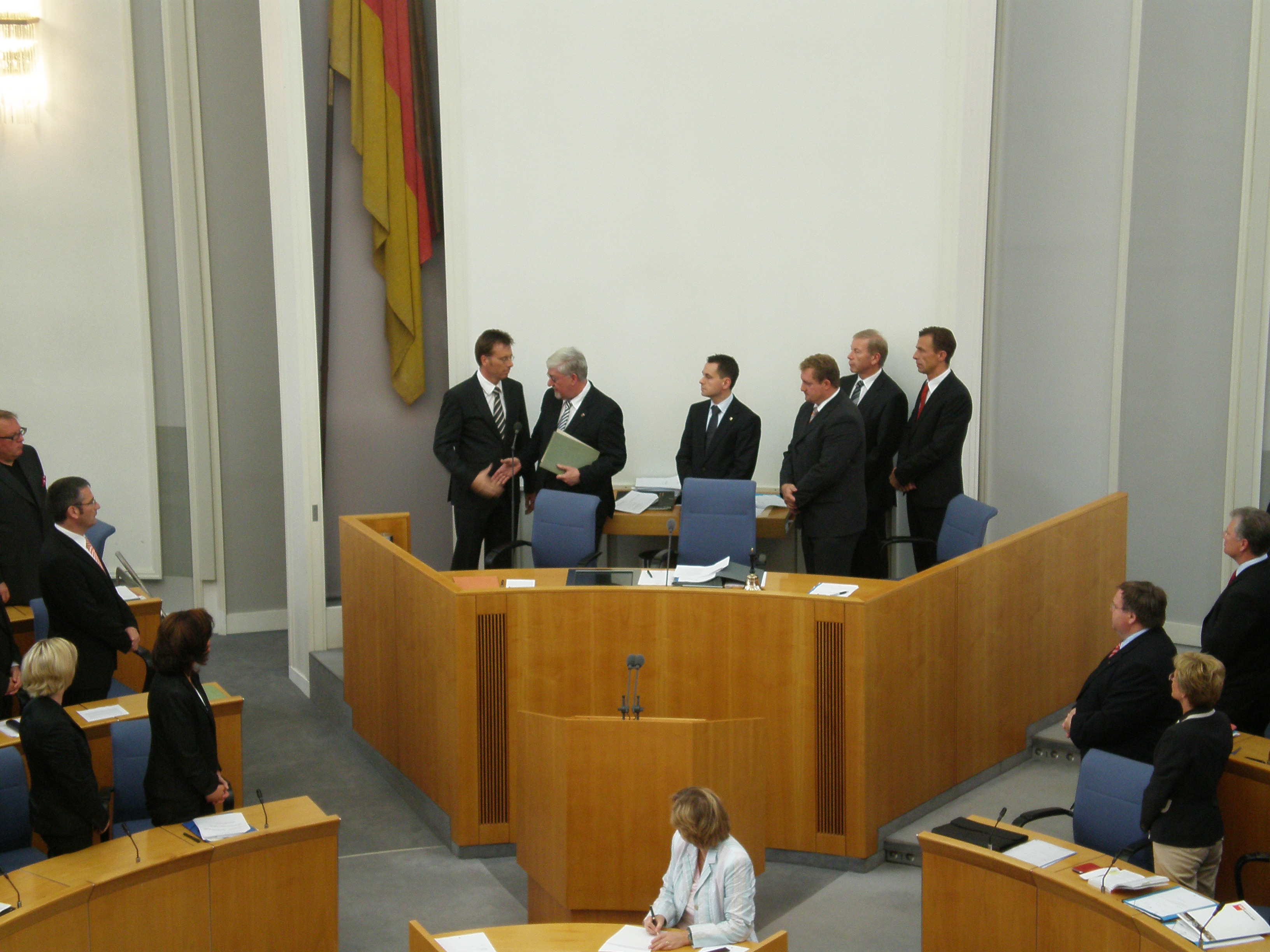 Vereidigung des neuen rheinland-pfälzischen Finanzministers Carsten Kühl im Plenarsaal des Landtages in Mainz